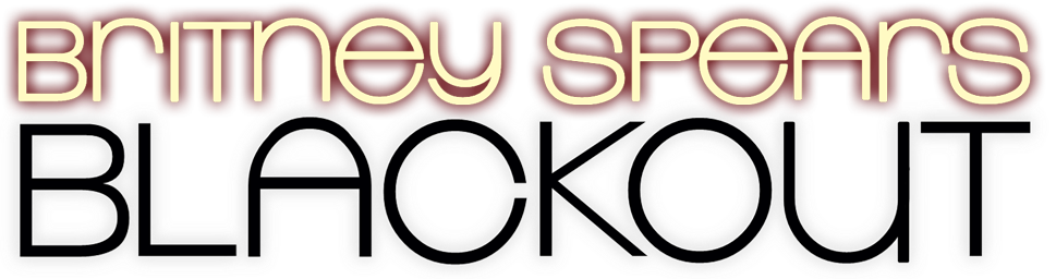 Logotipo del álbum de Britney Spears "Blackout".